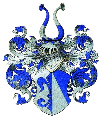 Wappen des norwegisch-dänischen Adelsgeschlechts Benkestok.